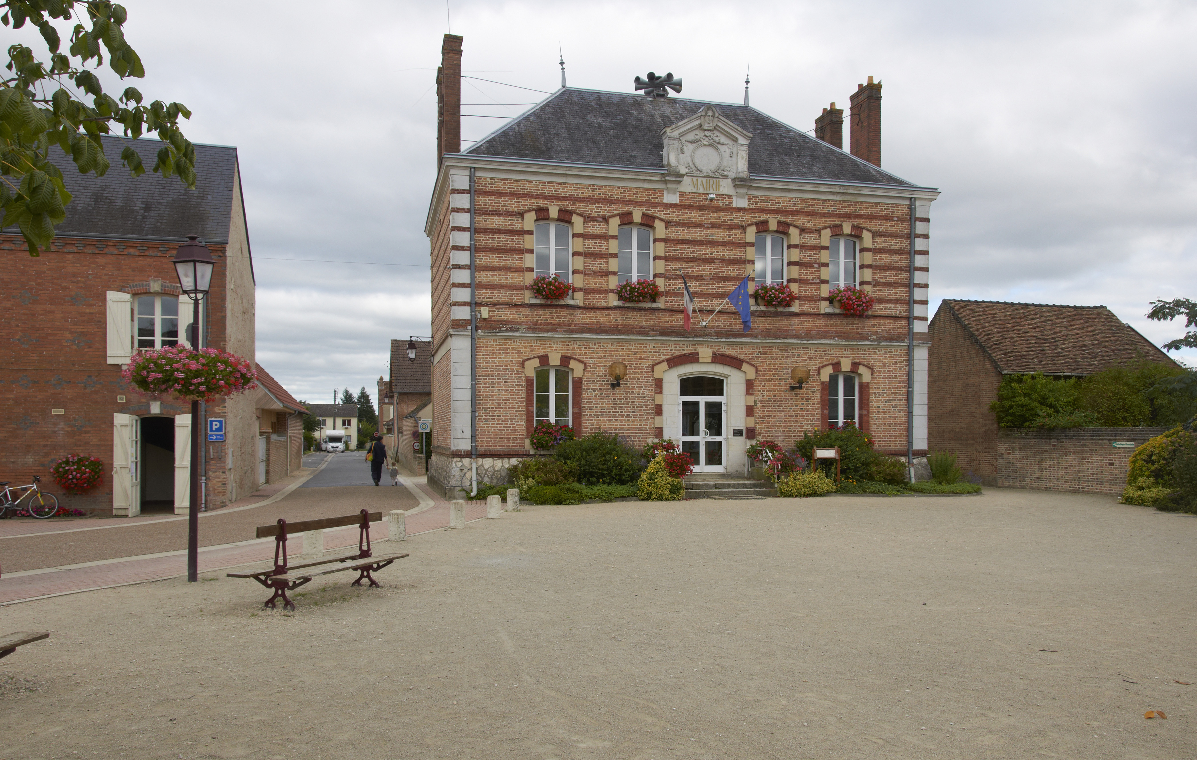 Town hall in Vouzon, France